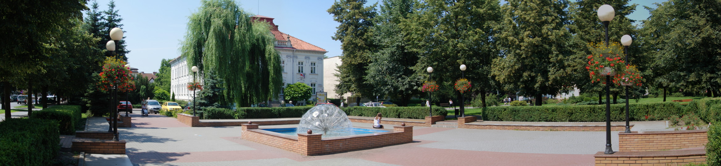 Tarnobrzeg. Fontanna na placu Antoniego Surowieckiego.